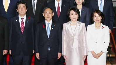 Shinzō Abe, Prime Minister, posed for the photo with Yoshihide Suga, Chief Cabinet Secretary, Kōichi Hagiuda, Hiroshige Sekō, Kazuhiro Sugita, Deputy Chief Cabinet Secretaries, Karen Makishima, Yasuyuki Sakai, Hirohisa Takagi, Keiichi Koshimizu, Hiroshi Moriya, Atsushi Koga, Yoshinori Tadokoro, Hitoshi Kikawada, Masakazu Hamachi, Miki Yamada, Toshitaka Ōoka, Yūsuke Nakanishi, Shigeru Dōko, Mayuko Toyota, Hiromi Mitsubayashi, Fusae Ōta, Kanji Katō, Hidemichi Satō, Tsuneo Kitamura, Tsuyoshi Hoshino, Hideki Miyauchi, Kiyoshi Ejima, Jun Tsushima, Makoto Oniki, Tōru Shiraishi, Hiromichi Kumada, and Satoshi Fujimaru, Parliamentary Secretaries, at the Prime Minister's Official Residence in Chiyoda Ward, Tōkyō Metropolis on October 9, 2015.